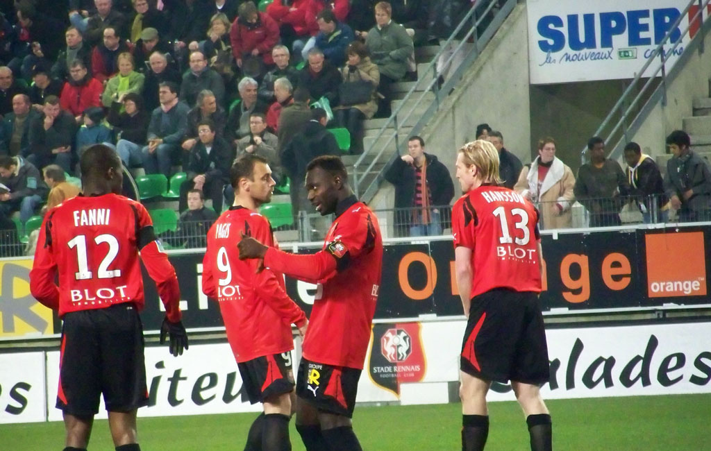 Match de Foot Rennes - Lorient, 23 Février 2008, Ligue 1 Saison 2007-2008. De gauche à droite : Rod Fanni, Mickaël Pagis, John Mensah et Petter Hansson